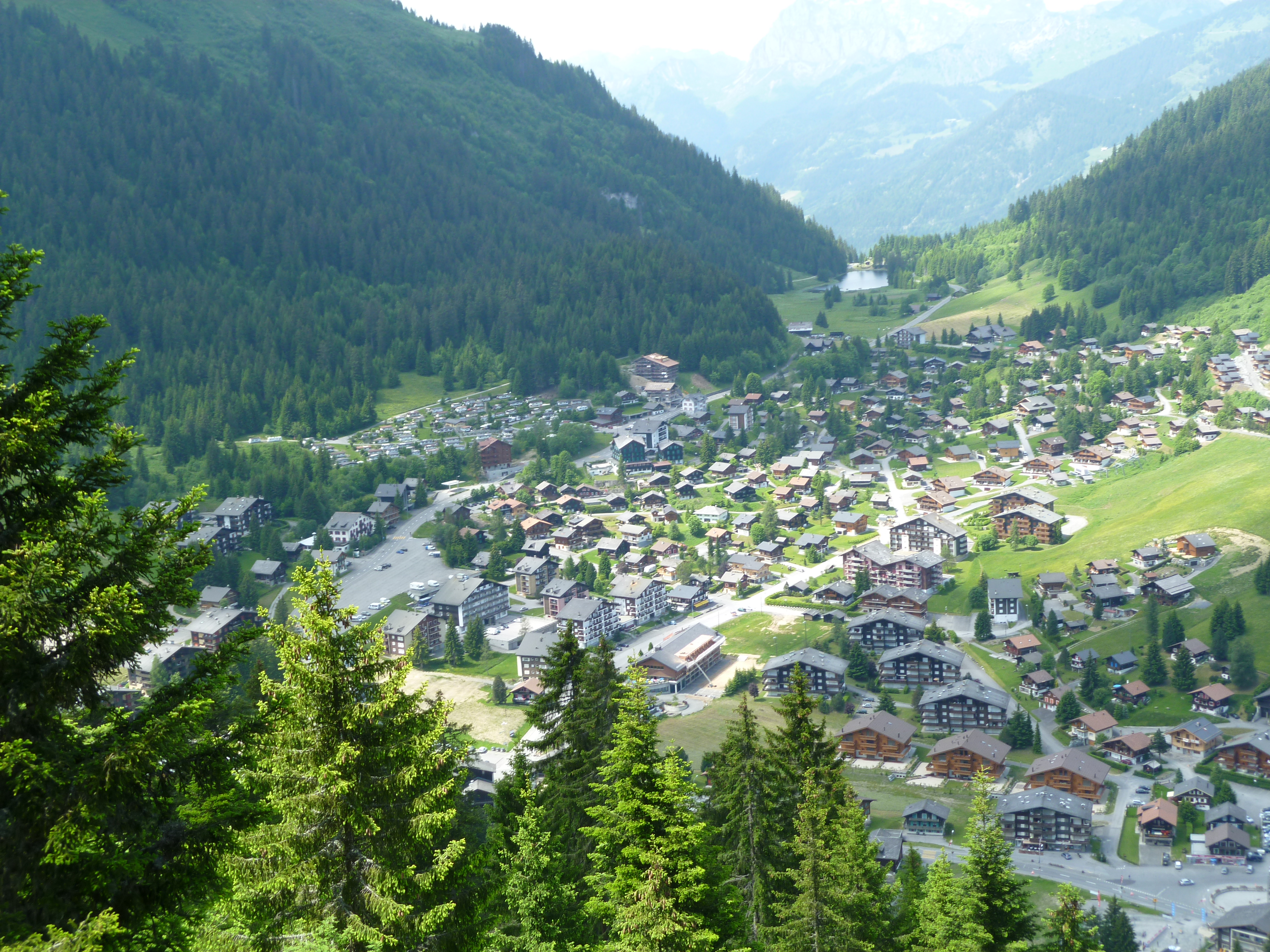 Vue de la station de Morgins depuis le télésiège de la Foilleuse.